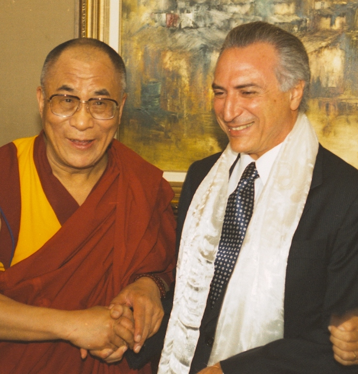 Michel Temer e Dalai Lama